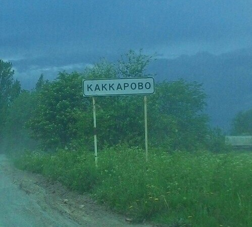 Дорожный знак